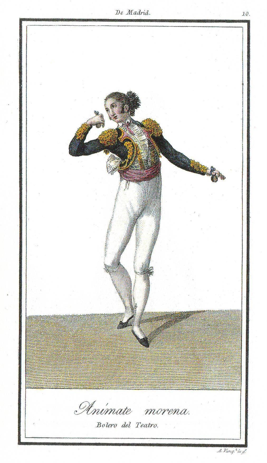 Antonio Rodríguez (1765–1823) Alternative names Antonio RodríguezDescriptionSpanish engraver and painterDate of birth/death 1765 1823 Location of birth/death Valencia ValenciaWork location Madrid. ValenciaAuthority control : Q19839243 VIAF: 99638871 ISNI: 0000 0001 0928 4589 ULAN: 500037980 LCCN: n83012058 GND: 143185209 WorldCat creator QS:P170,Q19839243 (Valencia, 1765 - Madrid, ca. 1825); Grabado y dibujado por Antonio Rodríguez; publicado en 1801. Reproducción facsímil de treinta y ocho estampas, más catorce variantes, de los Trajes de Madrid. Todas iluminadas. Introducción de Juan Carrete Parrondo, Madrid (1989). ISBN 84 78120696.